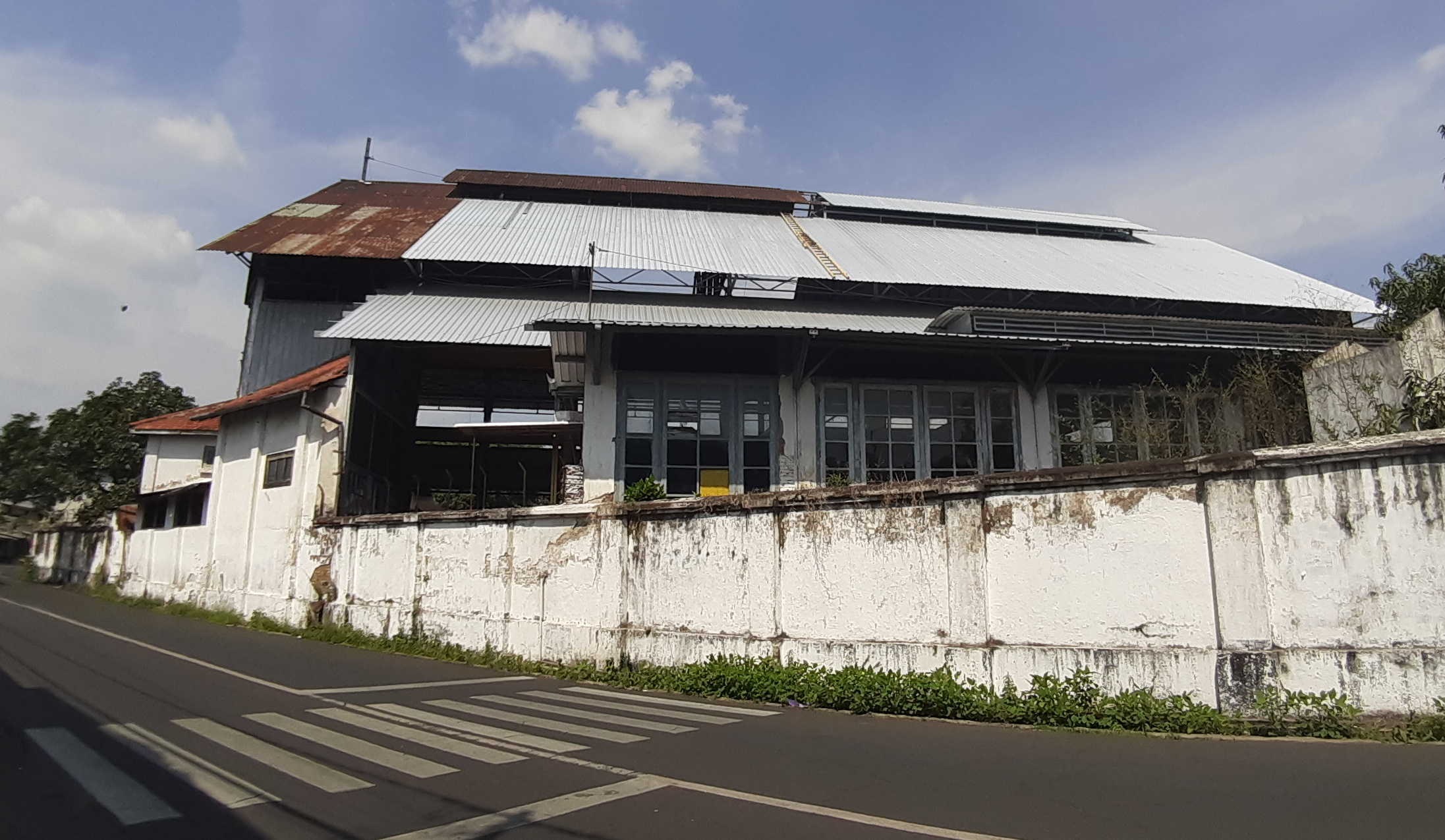 Bangunan depo di dekat Stasiun Jember, tempat lokomotif dirawat seusai dipakai menarik kereta